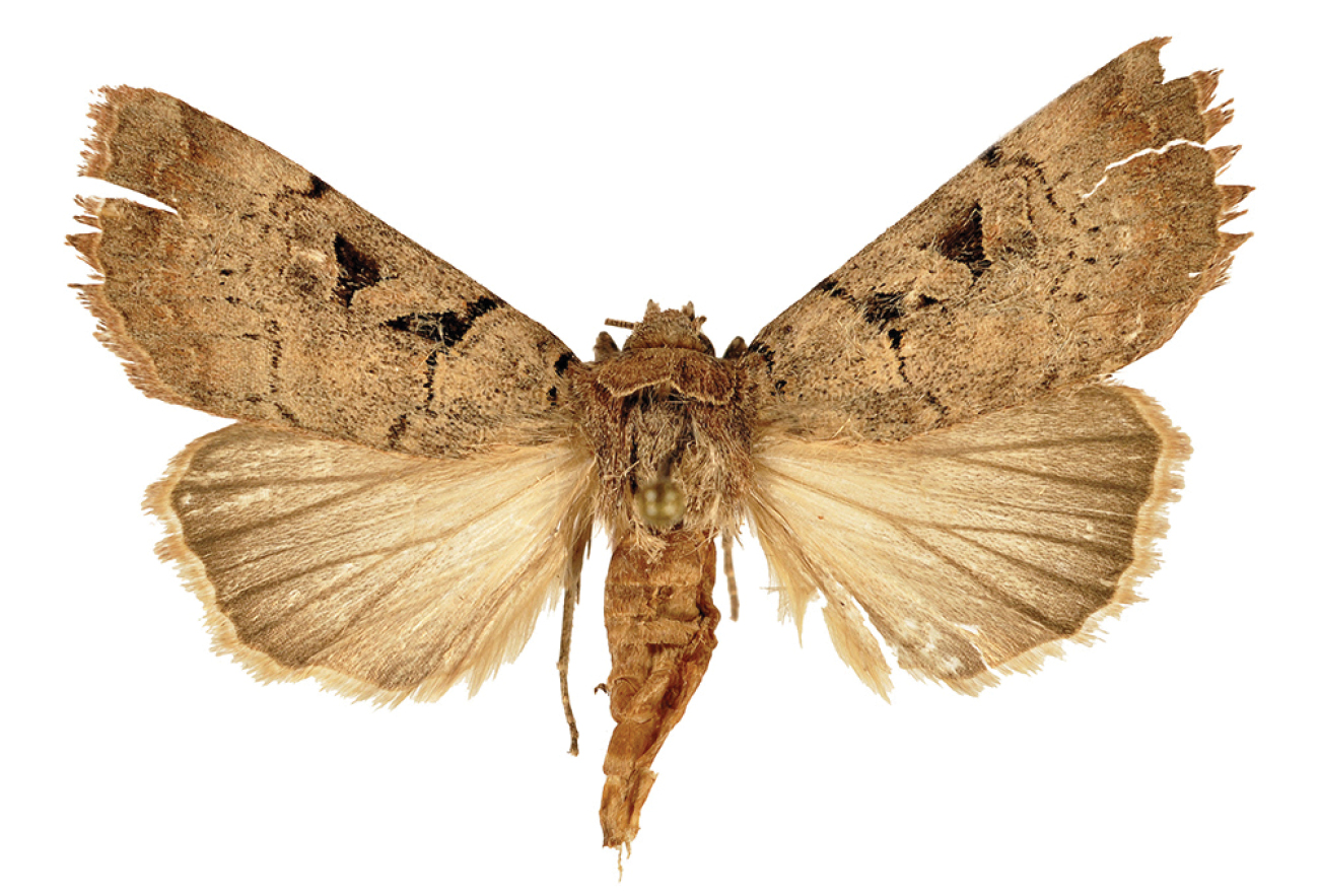 Anagnorisma chamrani